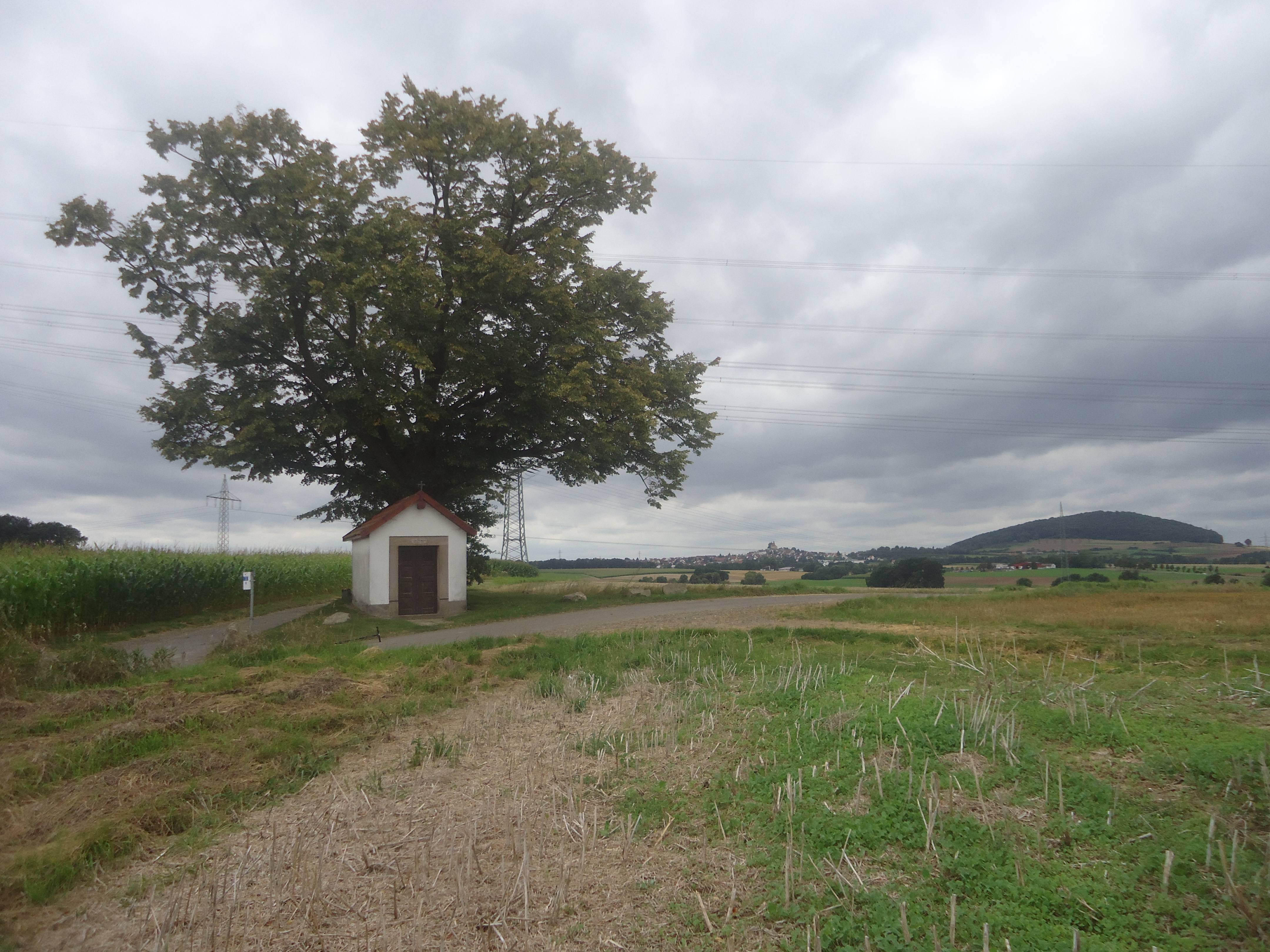 Kapelle des Ortes Rex mit der Liobakirche (Petersberg) und dem Rauschenberg im Hintergrund.